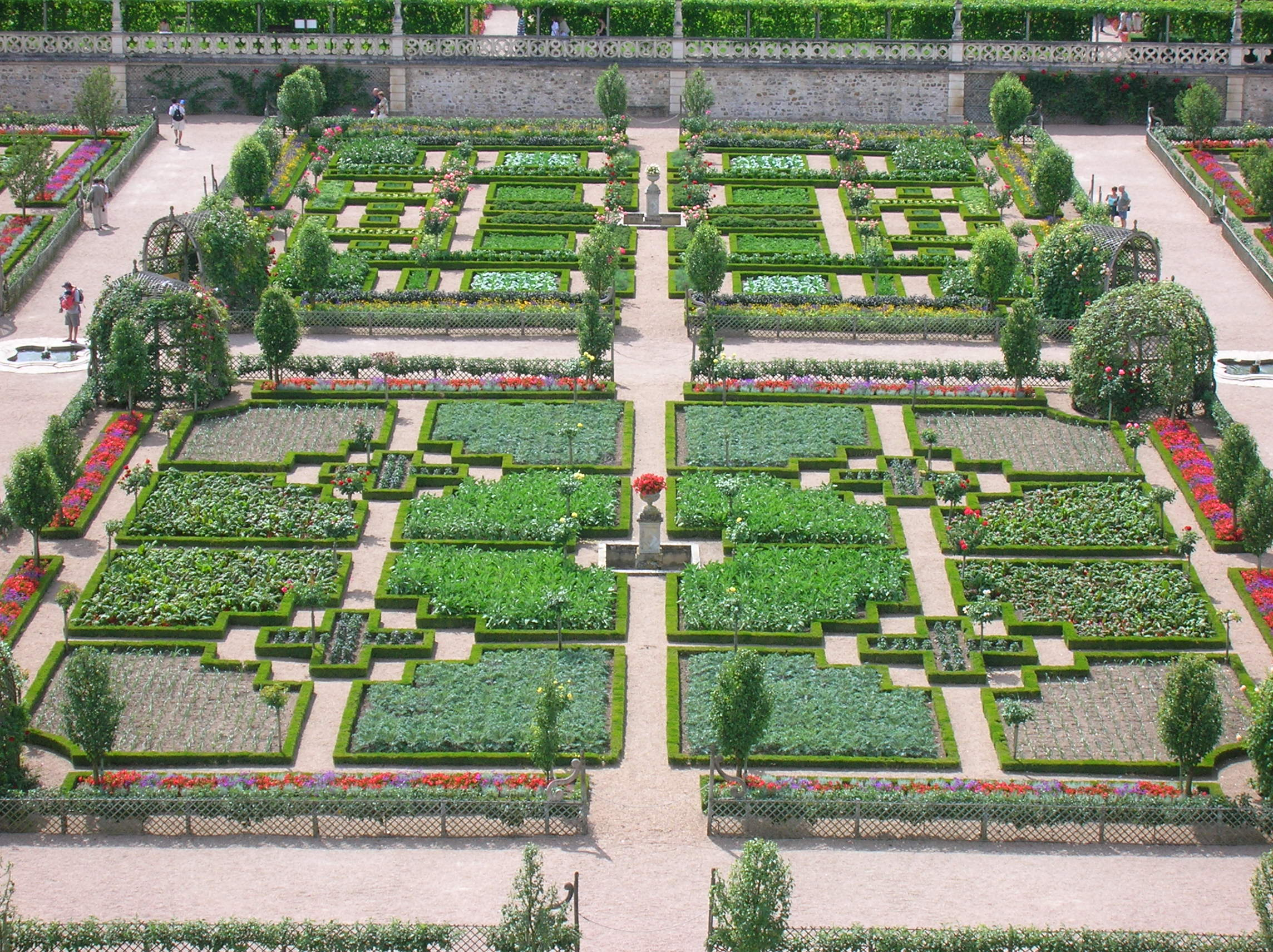 Les jardins de Villandry